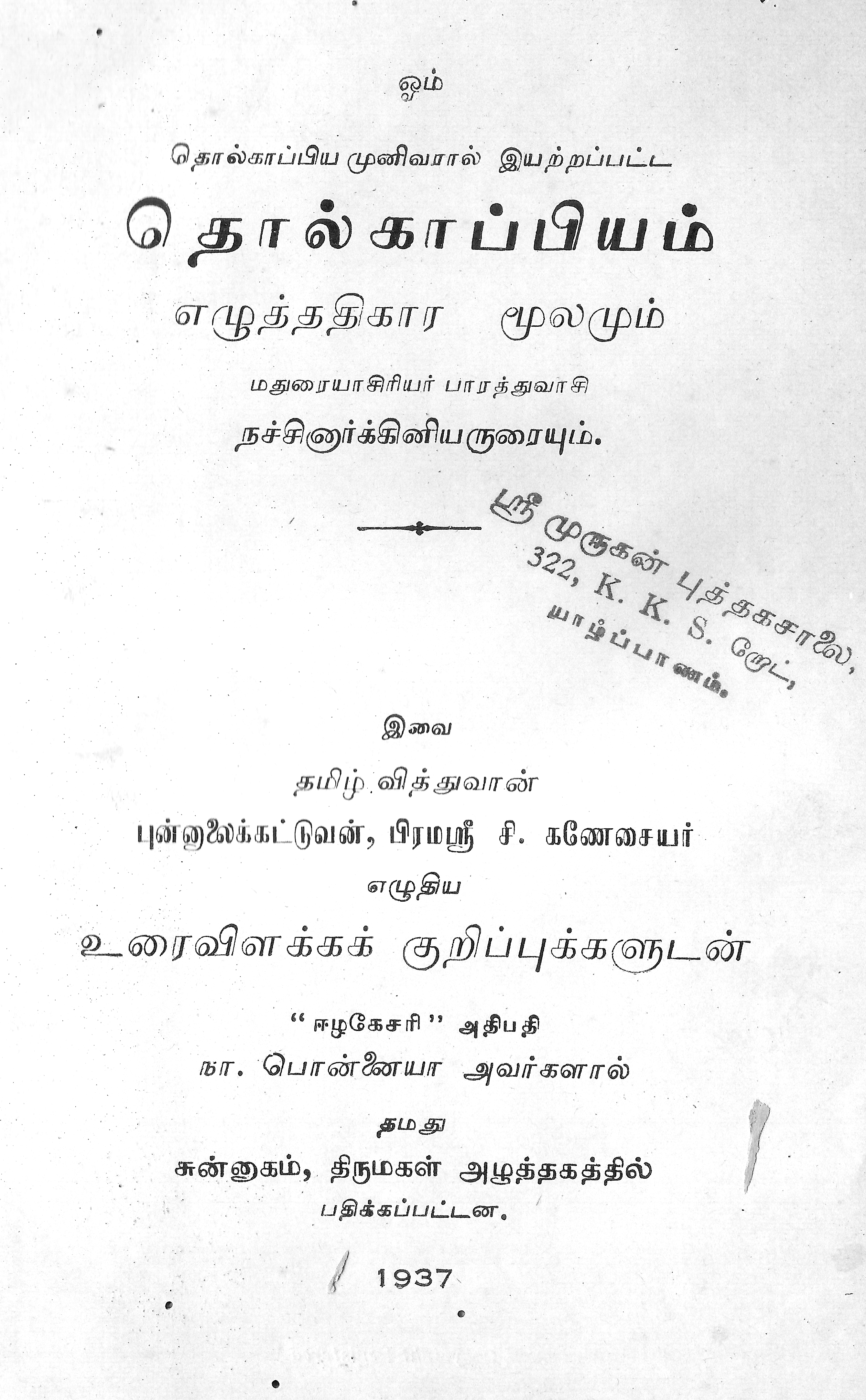 நூலின் முதல் பக்கம். தொல்காப்பியம் எழுத்ததிகாரம் நச்சினார்க்கினியர் உரை